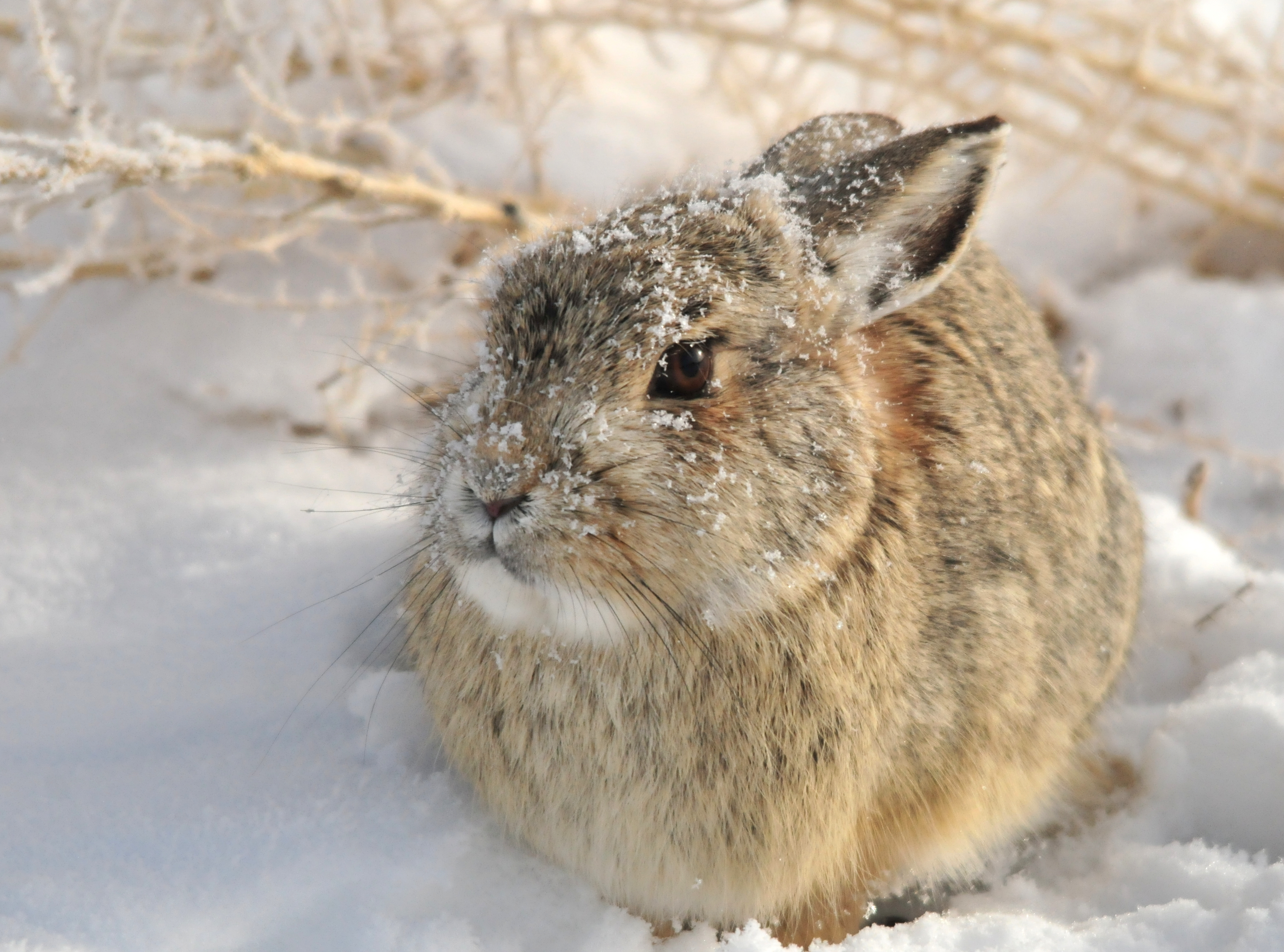 Photo: Tom Koerner/USFWS